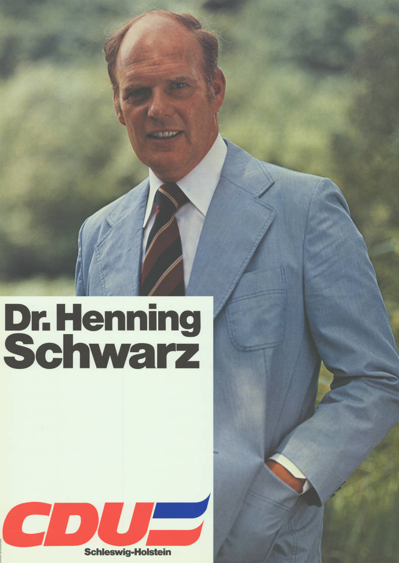 Dr. Henning Schwarz CDU Schleswig-Holstein Abbildung: Foto Plakatart: Kandidaten-/Personenplakat mit Porträt Auftraggeber: Verantw.: CDU Schleswig-Holstein Objekt-Signatur: 10-012 : 444 Bestand: Landtagswahlplakate Schleswig-Holstein (10-012) GliederungBestand10-18: Landtagswahlplakate Schleswig-Holstein (10-012) » Landtagswahl am 29.4.1979 » Ankündigungsplakate Lizenz: KAS/ACDP 10-012 : 444 CC-BY-SA 3.0 DE